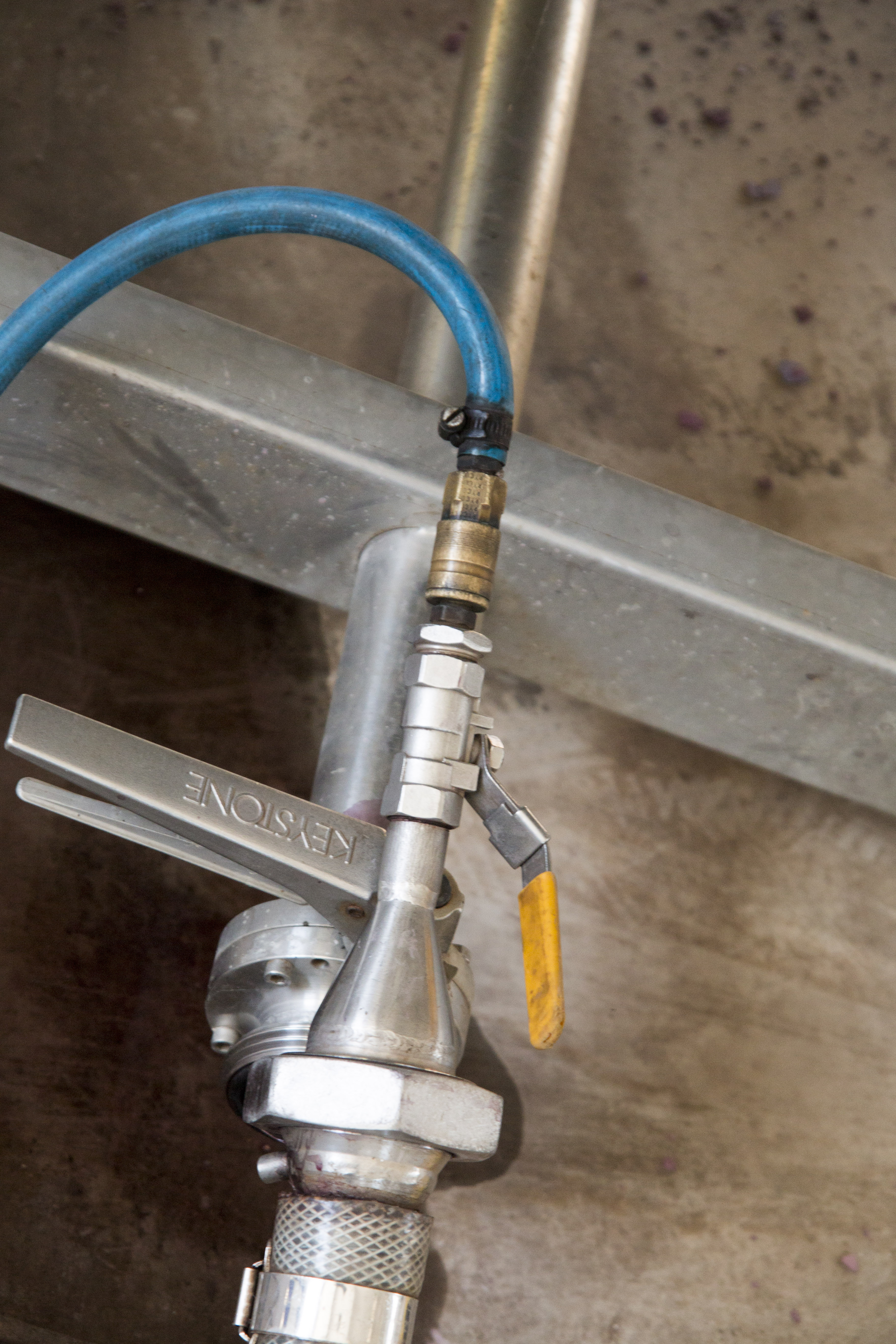 Wine pushed with gas